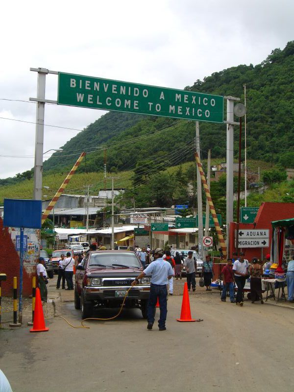 Guatemala-Mexico Border